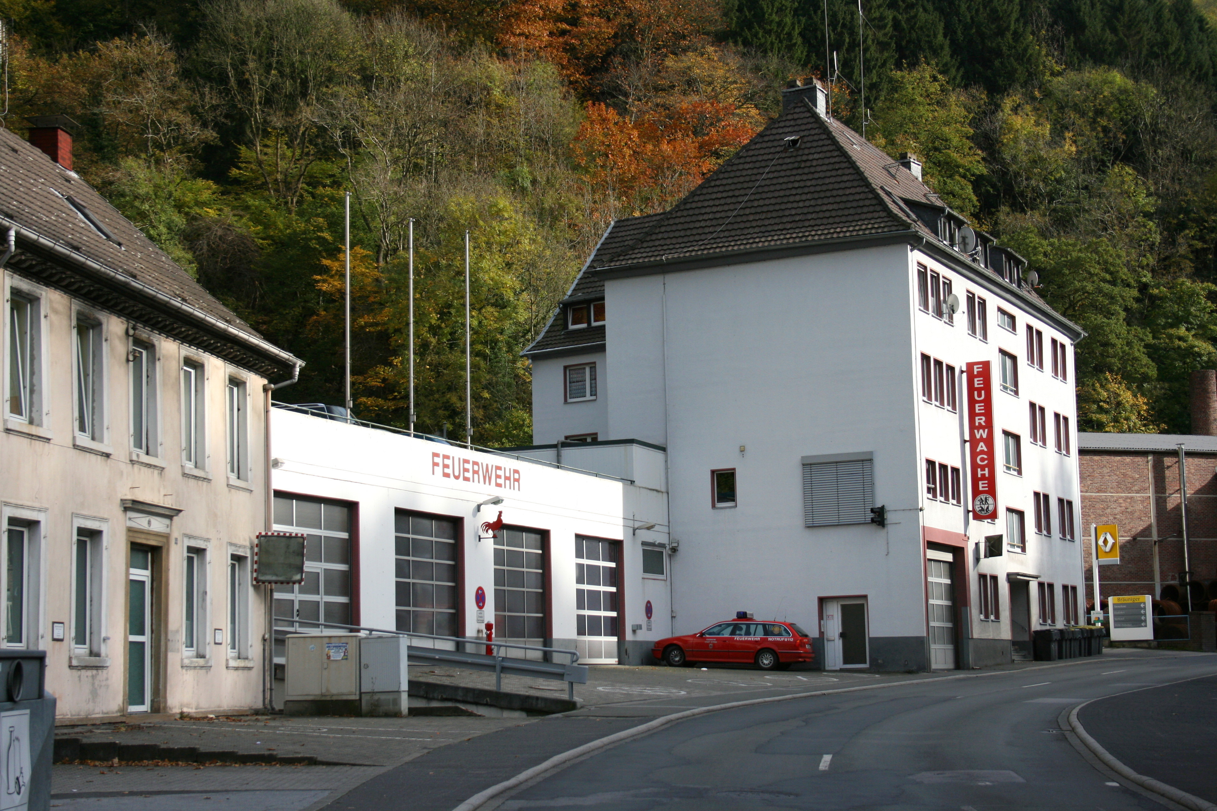 Feuerwache Bachstraße in Altena